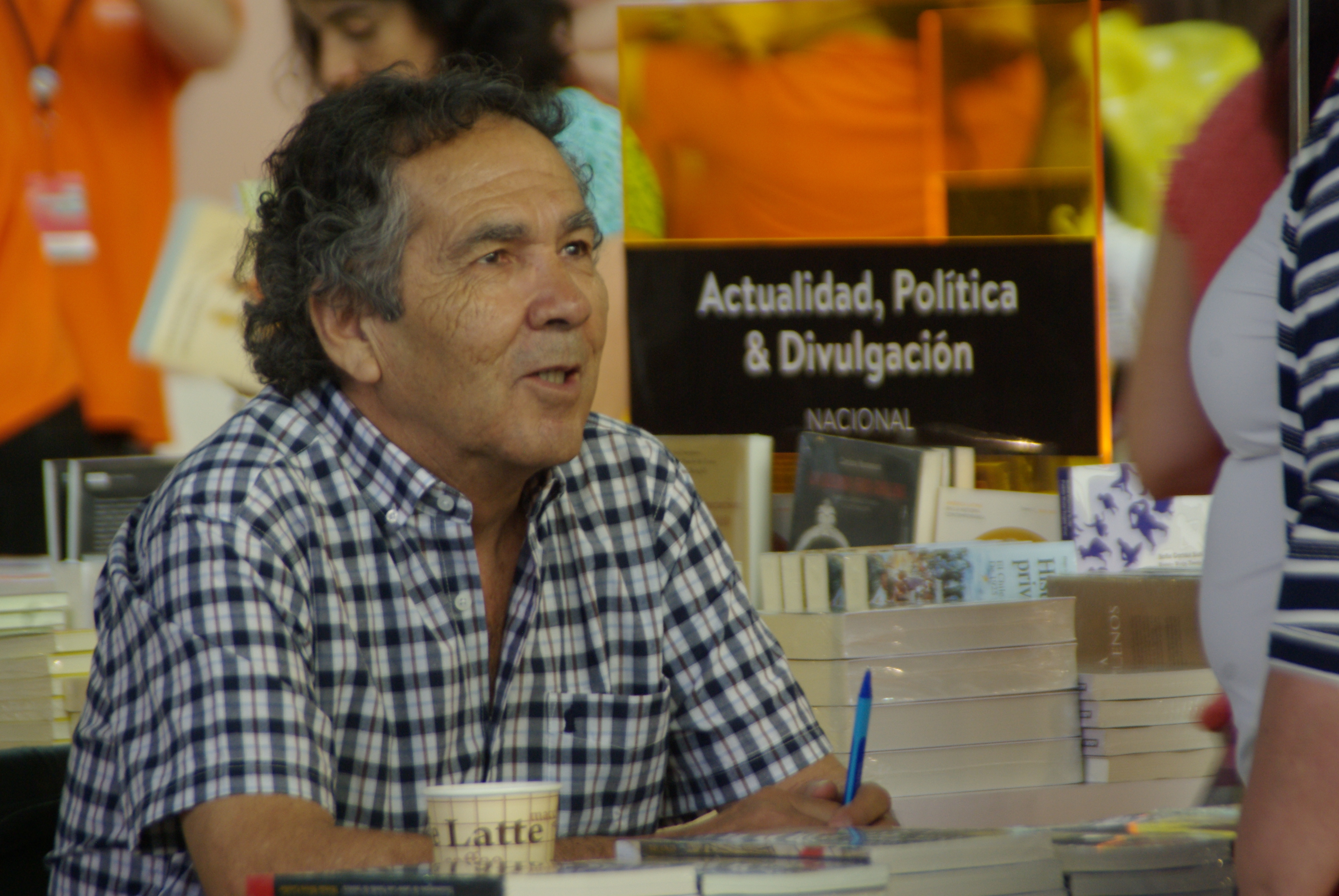 El escritor chileno Hernán Rivera Letelier en la Feria Internacional del Libro de Santiago 2015